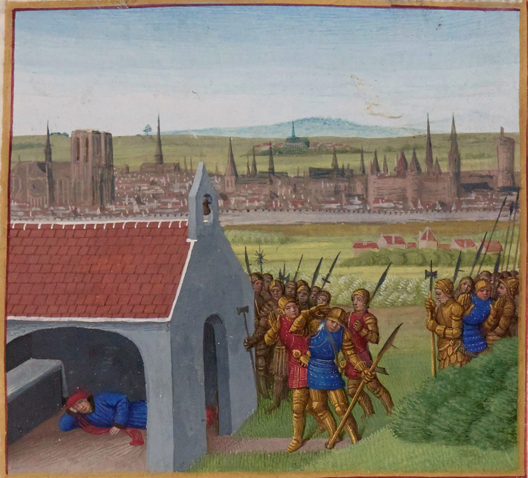 Dagobert Ier réfugié à Saint-Denis Grandes Chroniques de France, enluminées par Jean Fouquet, Tours, vers 1455-1460 Paris, BnF, département des Manuscrits, Français 6465, fol. 57 (Cinquième Livre) Après avoir coupé, par vengeance, la barbe et les moustaches de son maître Sadragésile, et craignant le courroux de son père, Dagobert Ier se réfugie à Saint-Denis. La protection des saints Denis, Rustique et Éleuthère empêche les sergents du roi Clotaire de pénétrer dans la chapelle des trois martyrs située à quelques lieues de Paris.